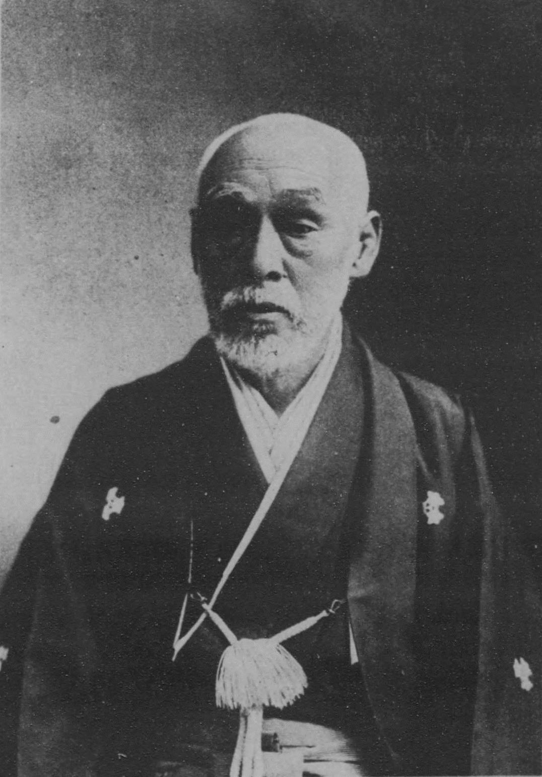 村田保 「喜寿の水産翁」『村田水産翁伝』